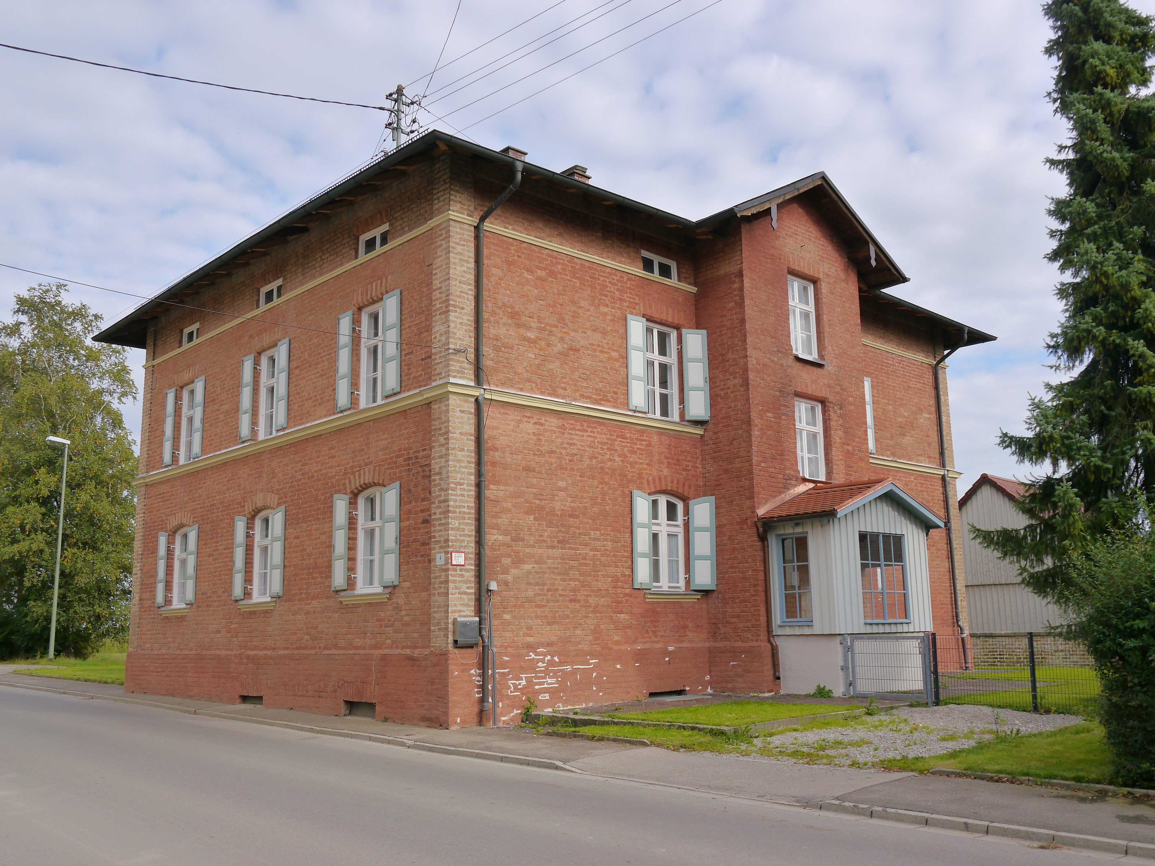 Gennach - Langerringer Straße 4 - PfarrhausThis is a photograph of an architectural monument.